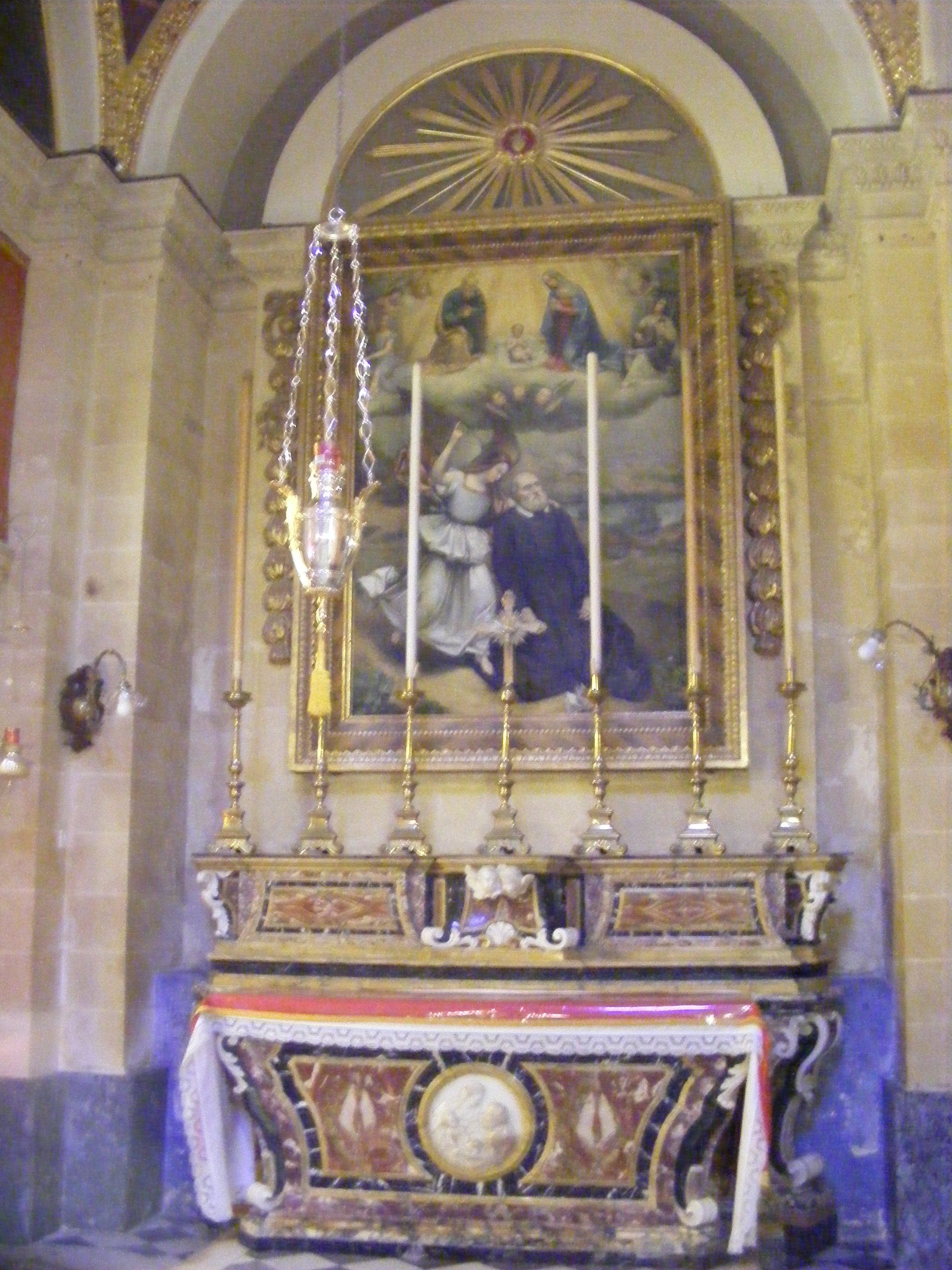 Ołtarz w kaplicy Narodzenia Pańskiego oraz św. Filipa Neri. Obraz tytularny pędzla Tommaso Madiony z 1852.